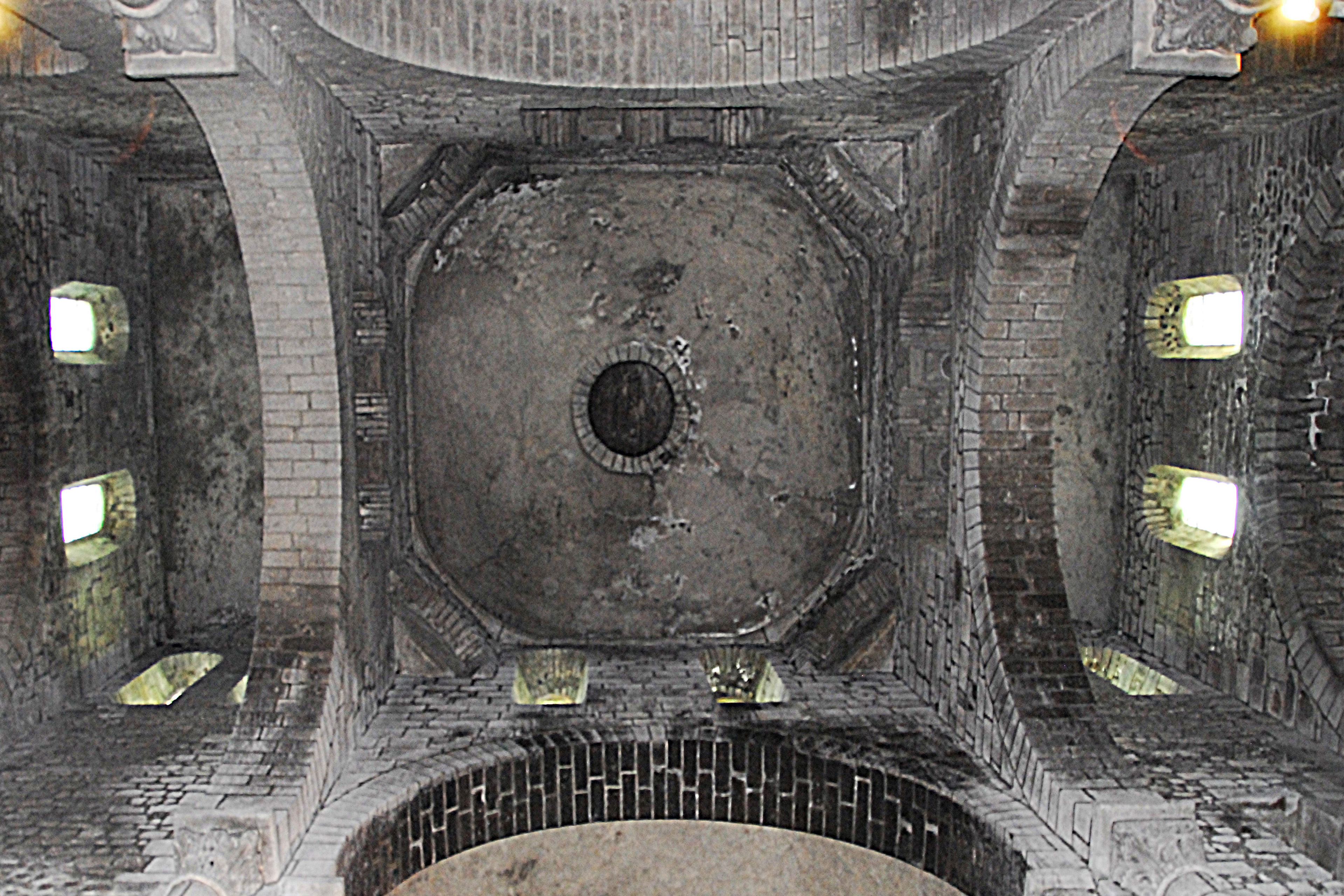 N.-D. d'Orcival, massif barlong, von unten